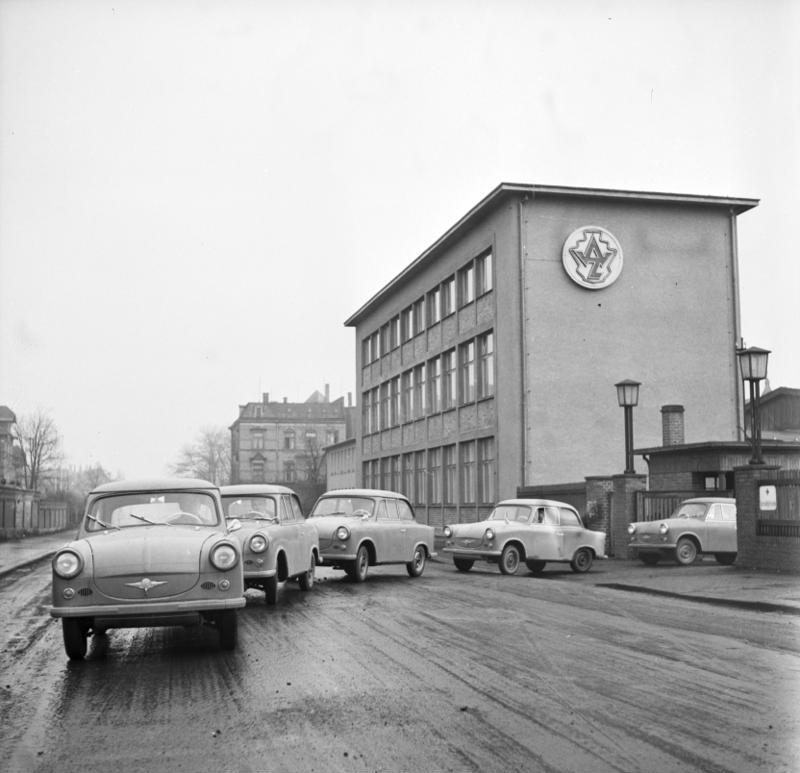 Trabant, Wagen der Nullserie verlassen das Werk Zentralbild/Schmidt 16.1.58 "Trabant" ein Erzeugnis des VEB Automobilwerk AWZ Zwickau Der VEB Automobilwerk AWZ Zwickau lenkt die Aufmerksamkeit der Fachwelt mit der Neukonstruktion des Kleinstwagens "Trabant" auf sich. In bahnbrechender Pionierarbeit schufen Forscher, Ingenieure und Facharbeiter den neuen mit Stahlblechgerippe und Duroplaststoffverkleidung versehenen Personenkraftwagen. Hervorragende Eigenschaften wie niedriges spezifisches Gewicht, gute akustische Dämpfung und Isolierfähigkeit, absolute Korosionsbeständigkeit und hohe Elastizität lassen den Duroplaststoff zum Karosseriebaustoff der Zukunft werden. Dieser technische Fortschritt im Automobilbau der DDR weckt das Interesse der gesamten Fachwelt. Die jetzt anlaufende Nullserie ist eine Viersitzer-Limousine mit einem Zweitakt-, luftgekühlten Otto-Motor mit 18 PS bei 3.750 U/Min., Viergangschaltung, Einscheiben-Trockenkupplung und selbsttragender Karosserie. Der Kraftstoffverbrauch beträgt bei 100 km 6 Liter mit legierten Hyze-Zweitakt-Motoröl. UBz.: Wagen der Nullserie verlassen das Werk.